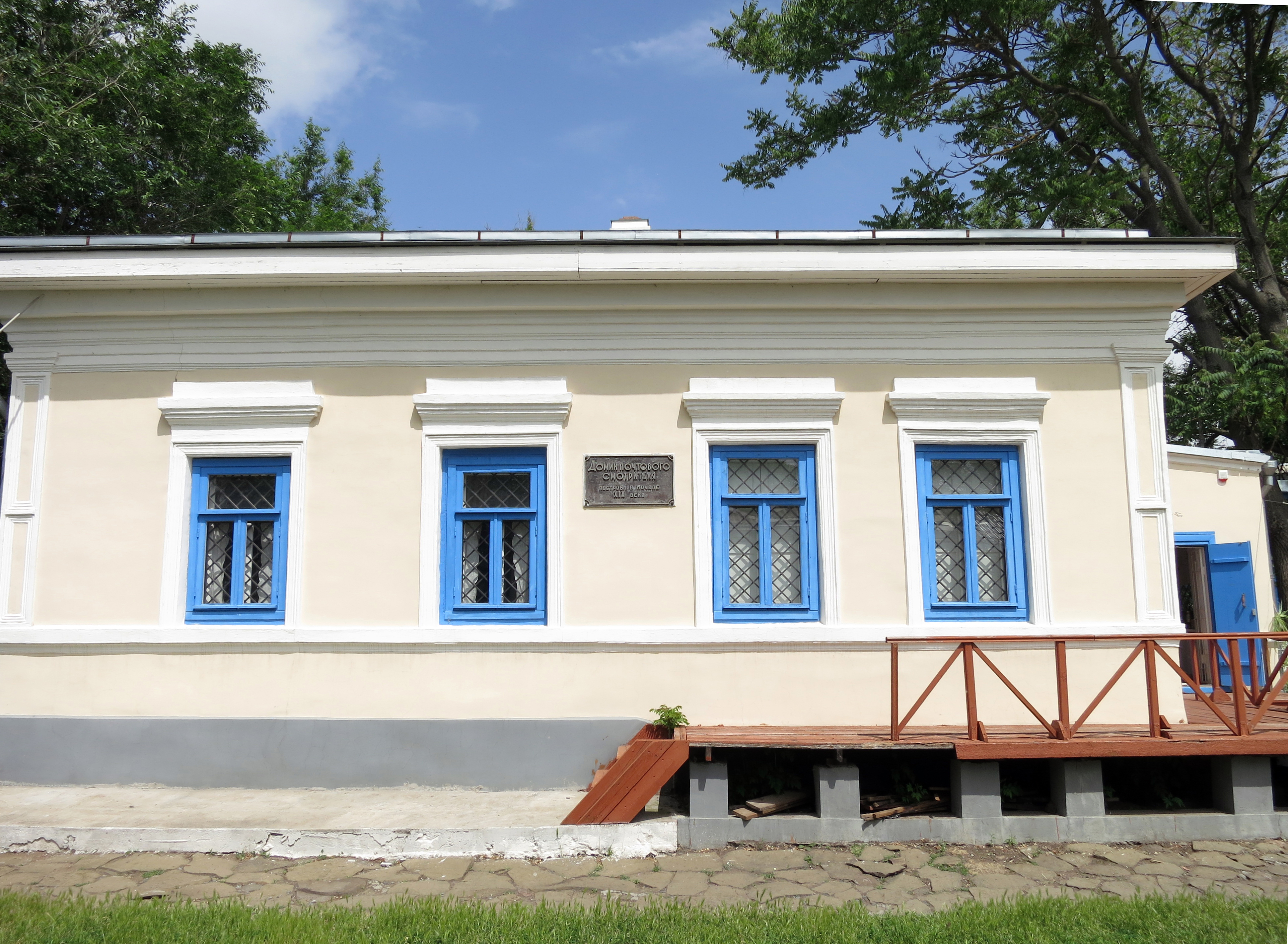 Здание почтовой конторы: спуск Будённовский, 3, Аксай, Аксайский район, Ростовская область